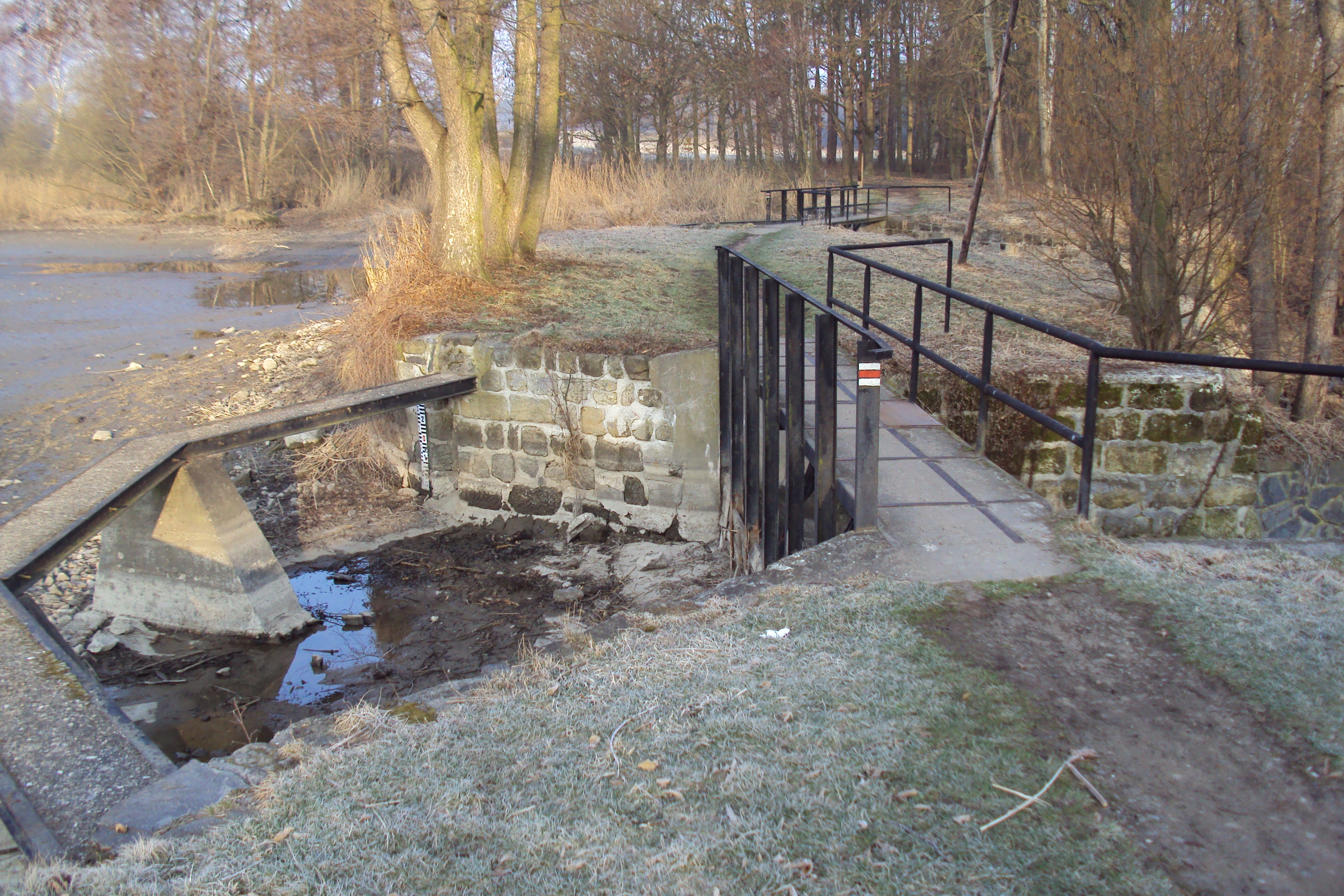 Výpusť právě vypuštěného Holanského rybníka poblíž Rybnova u Holan